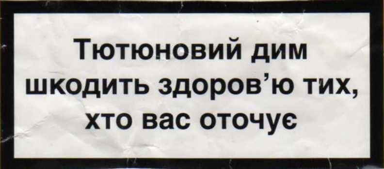 Avertissement sur un paquet de tabac à rouler vendu en Ukraine : "La fumée du tabac est nocive pour la santé de votre entourage"